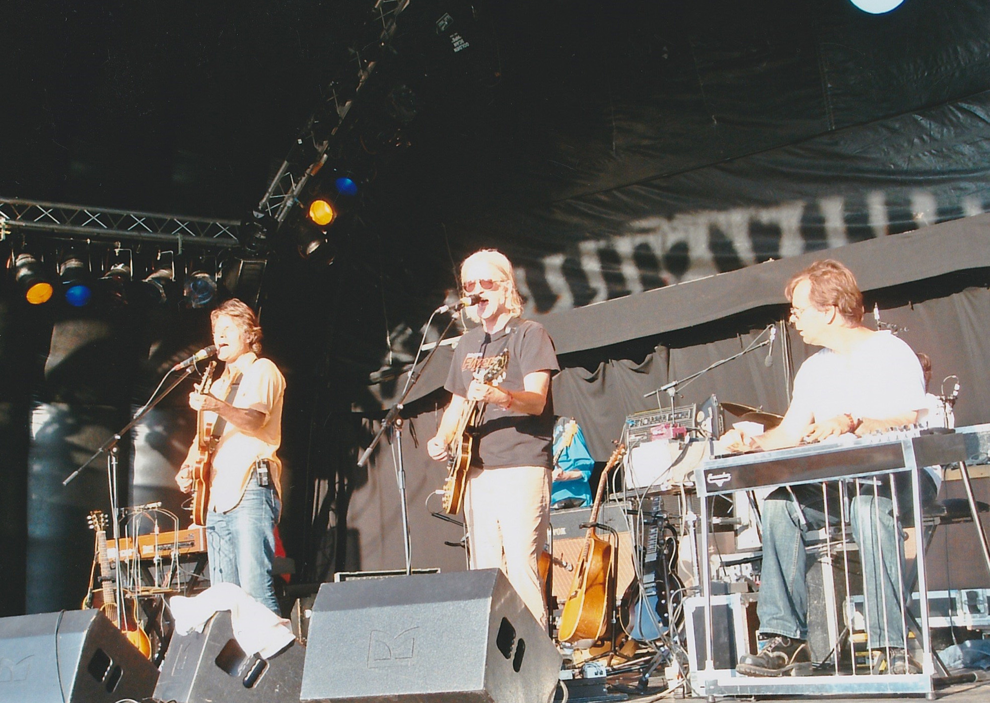 Blue Rodeo, Guilfest 2005